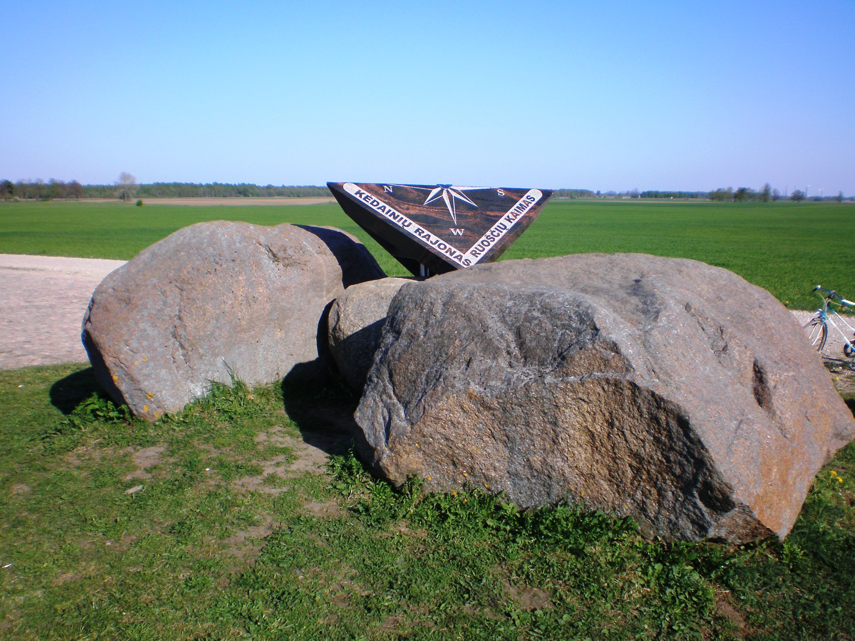 Lietuvos centras, Ruoščiai, Kėdainių raj.